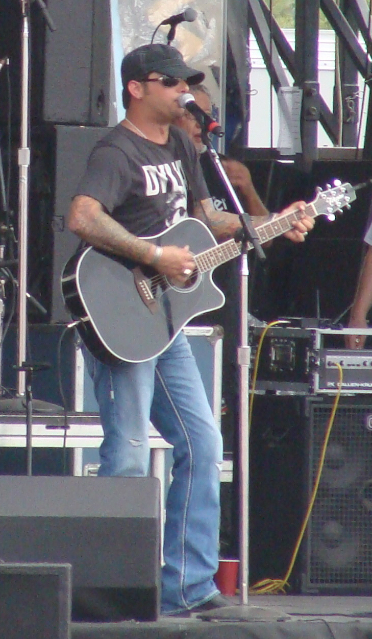 Matt Kennon